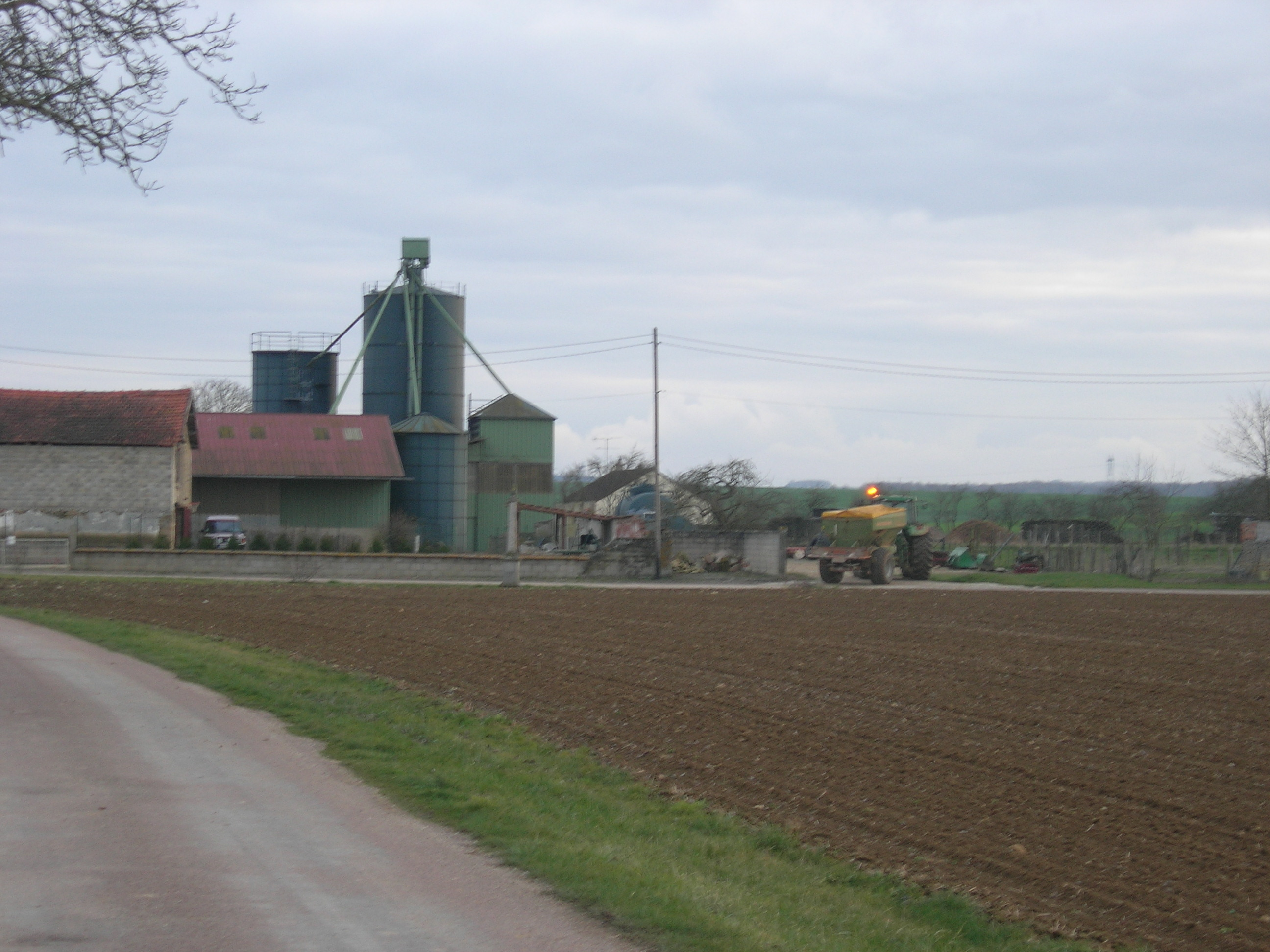 Exploitation Agricole Noblot